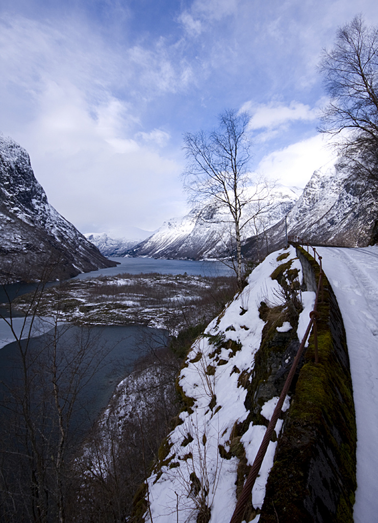 Lodalen i Nordfjord, Sogn og Fjordane